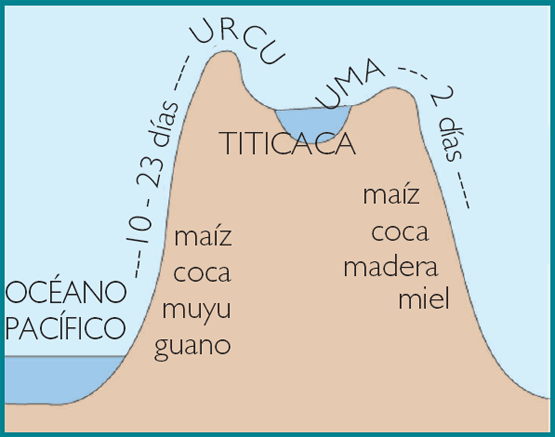 Pisos ecologicos